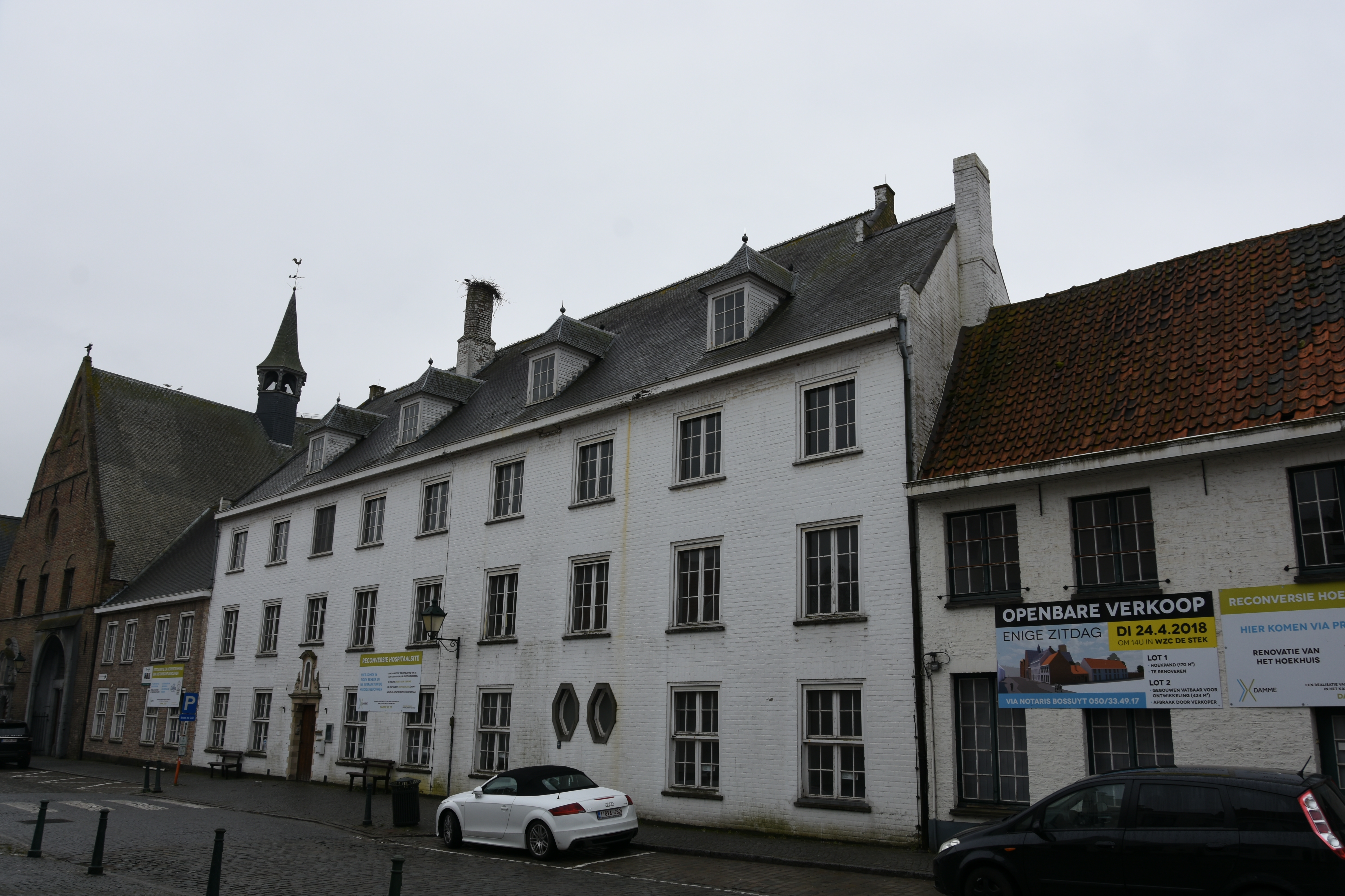 Rustoord Sint-Jan te Damme - beschermd gebouw dat afgebroken wordt